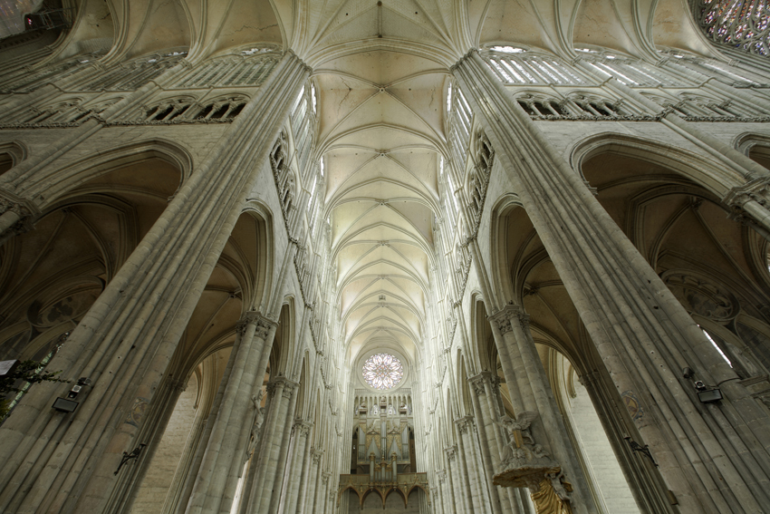 croisée .